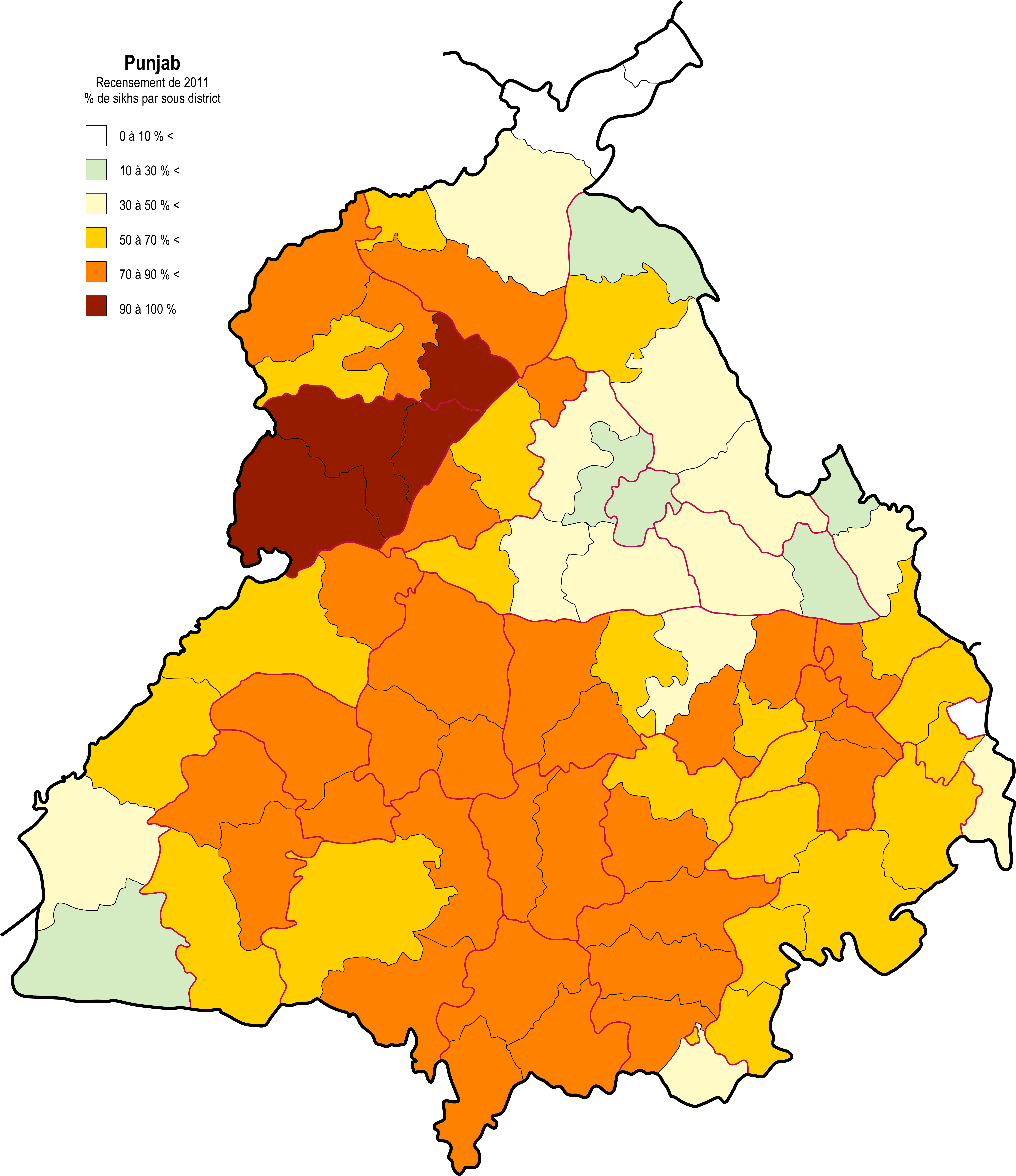 Pendjab : religion majoritaire ou première religion par sous district selon le recensement indien de 2011